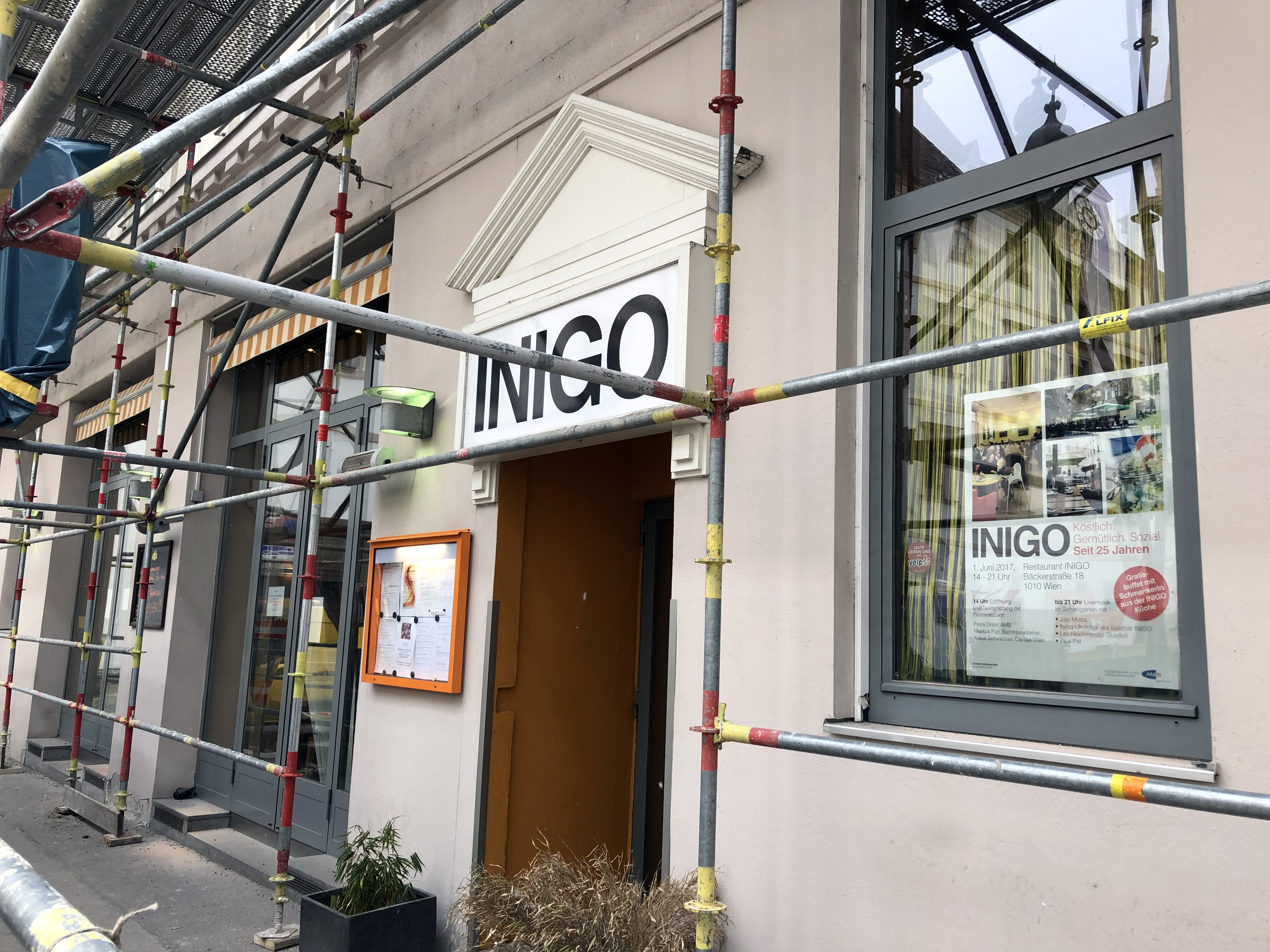 Außenansicht des Lokals